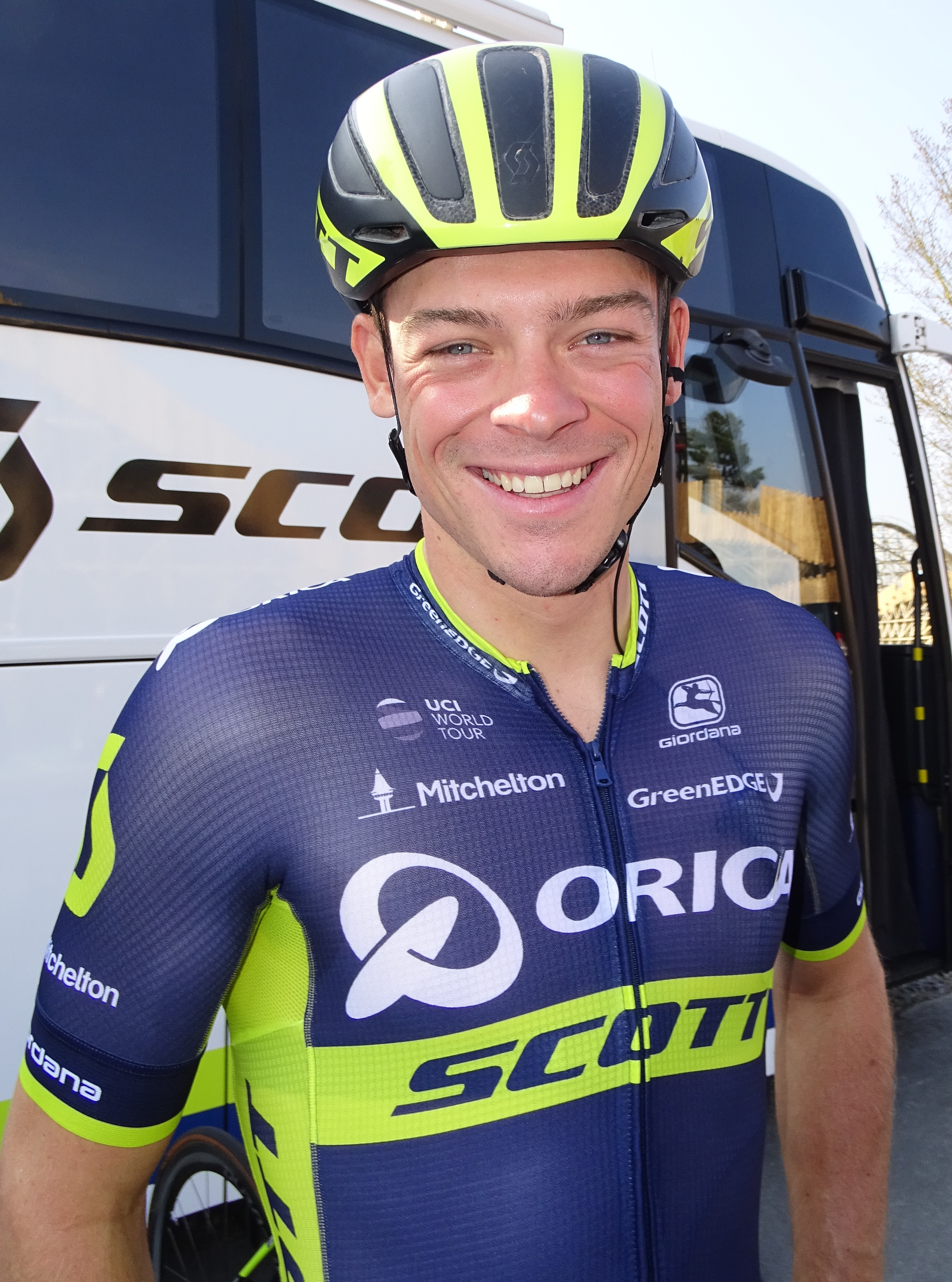 Reportage réalisé le mardi 28 mars à l'occasion de du départ de la première étape des Trois jours de La Panne 2017 à Adinkerque (La Panne), Belgique.